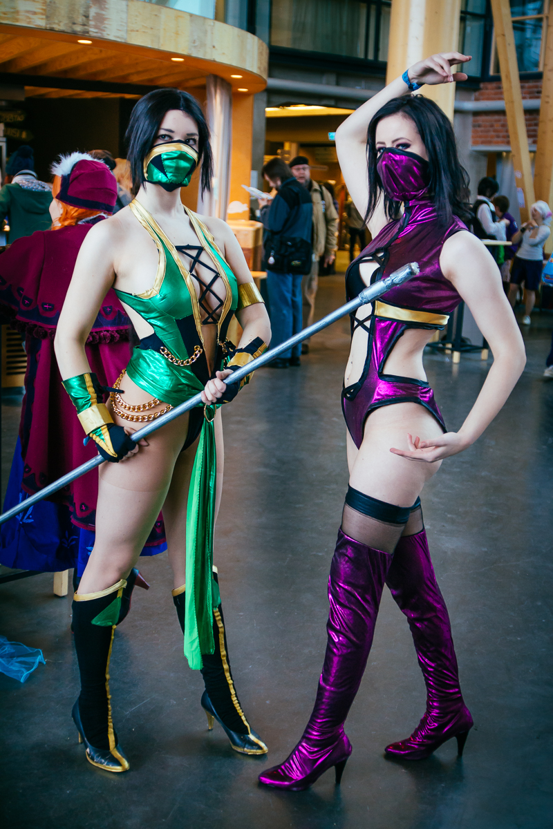 Desucon Frostbite 2014